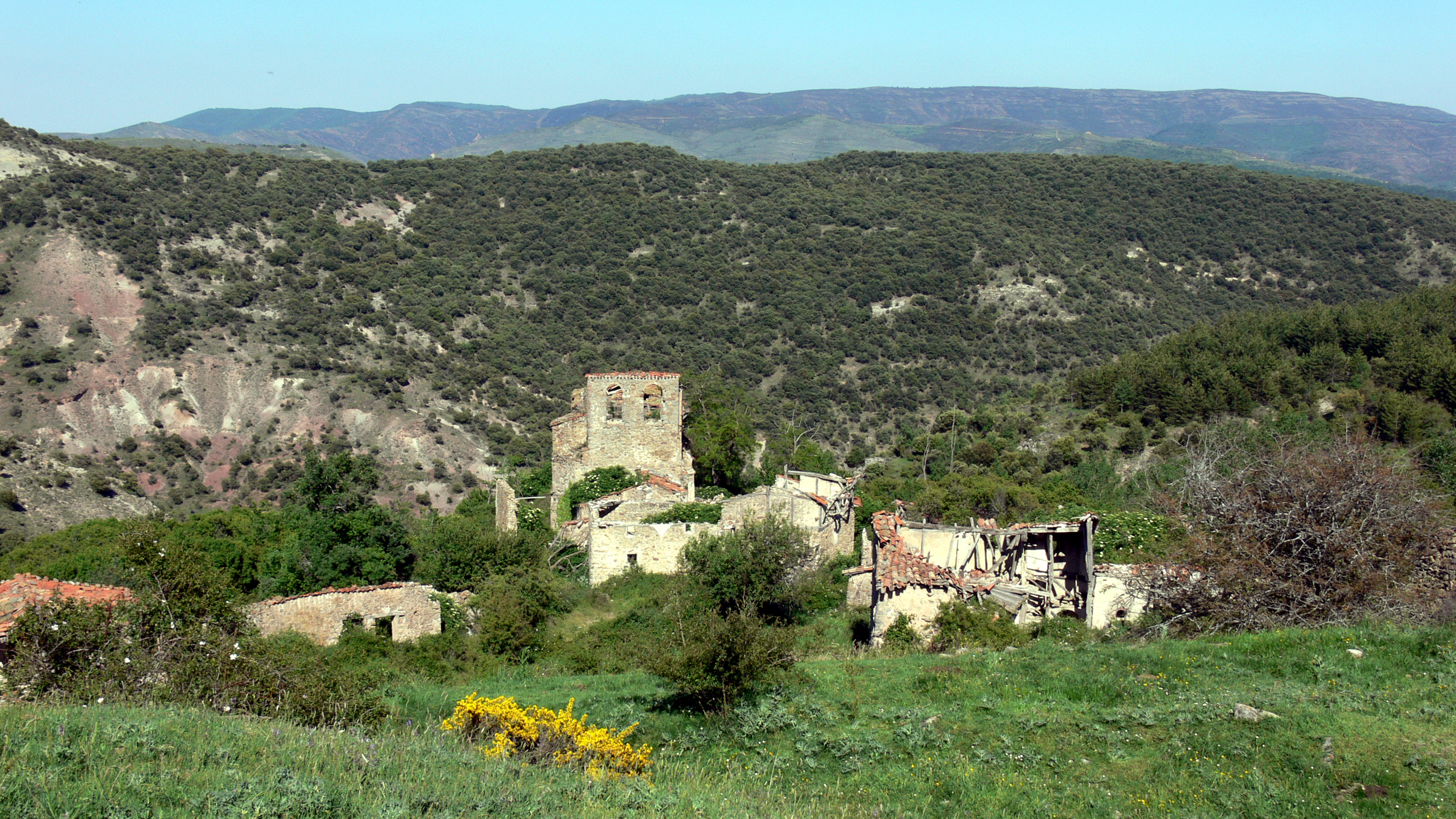 Montalbo en Cameros, despoblado de San Román de Cameros en La Rioja (España).